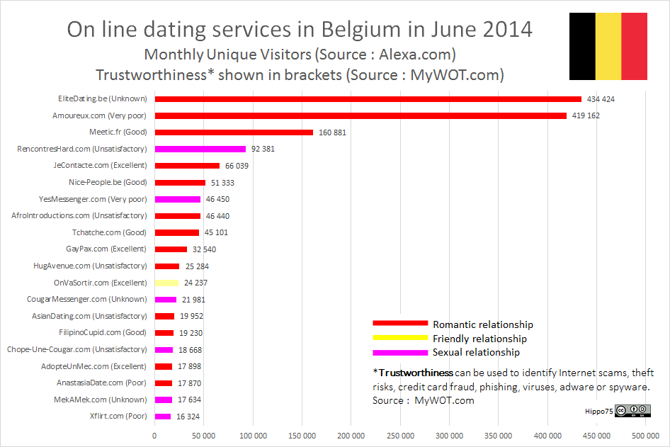 On line dating services in Belgium in June 2014 Monthly Unique Visitors (Source : ) Trustworthiness* shown in brackets (Source : )